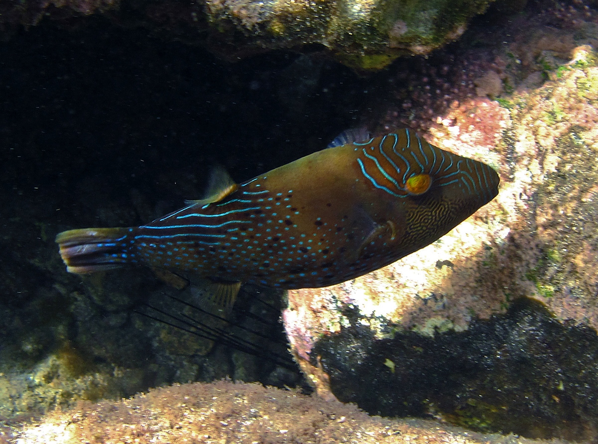 Canthigaster amboinensis à la Réunion.